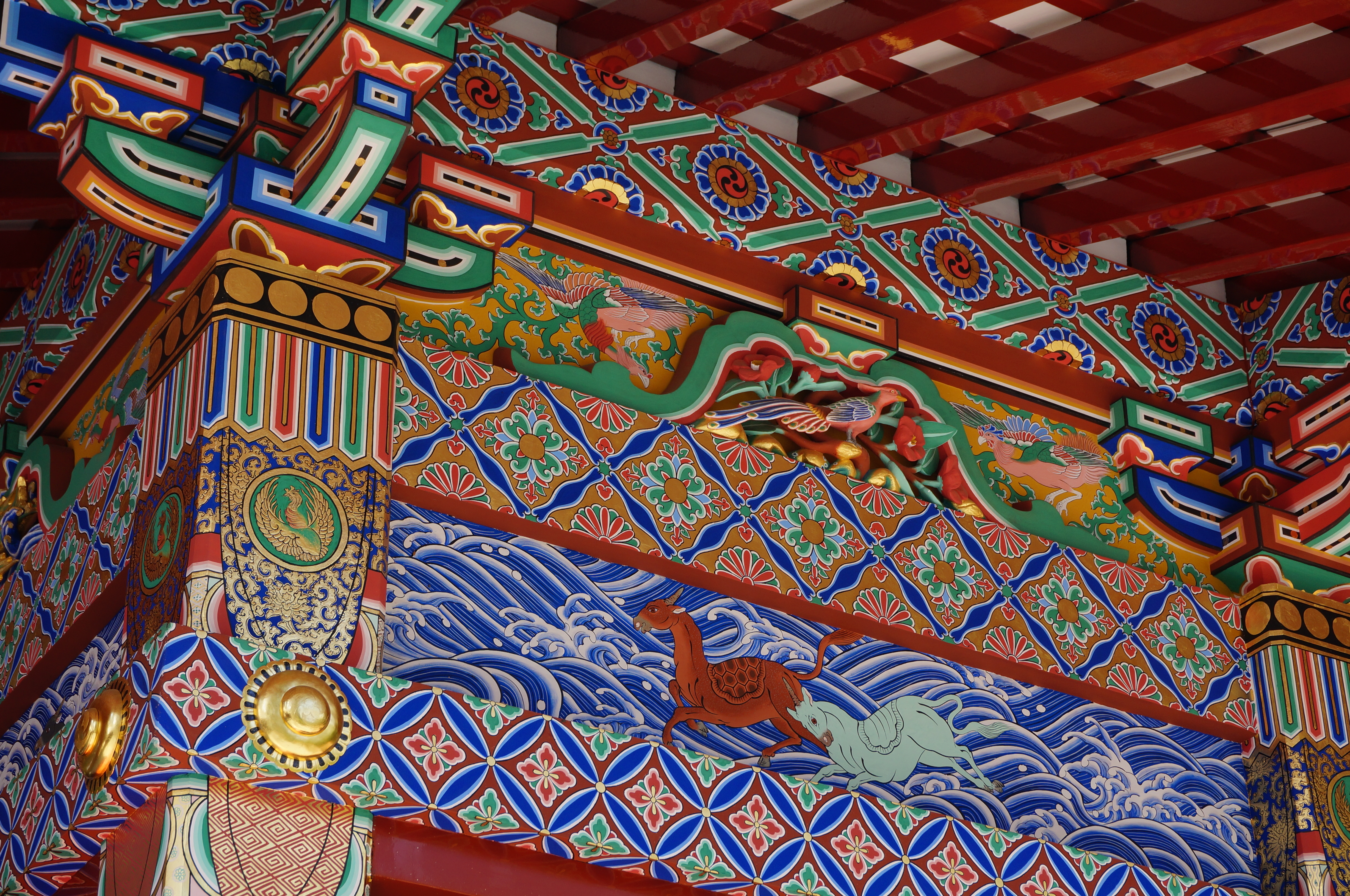 貫前神社拝殿彩色